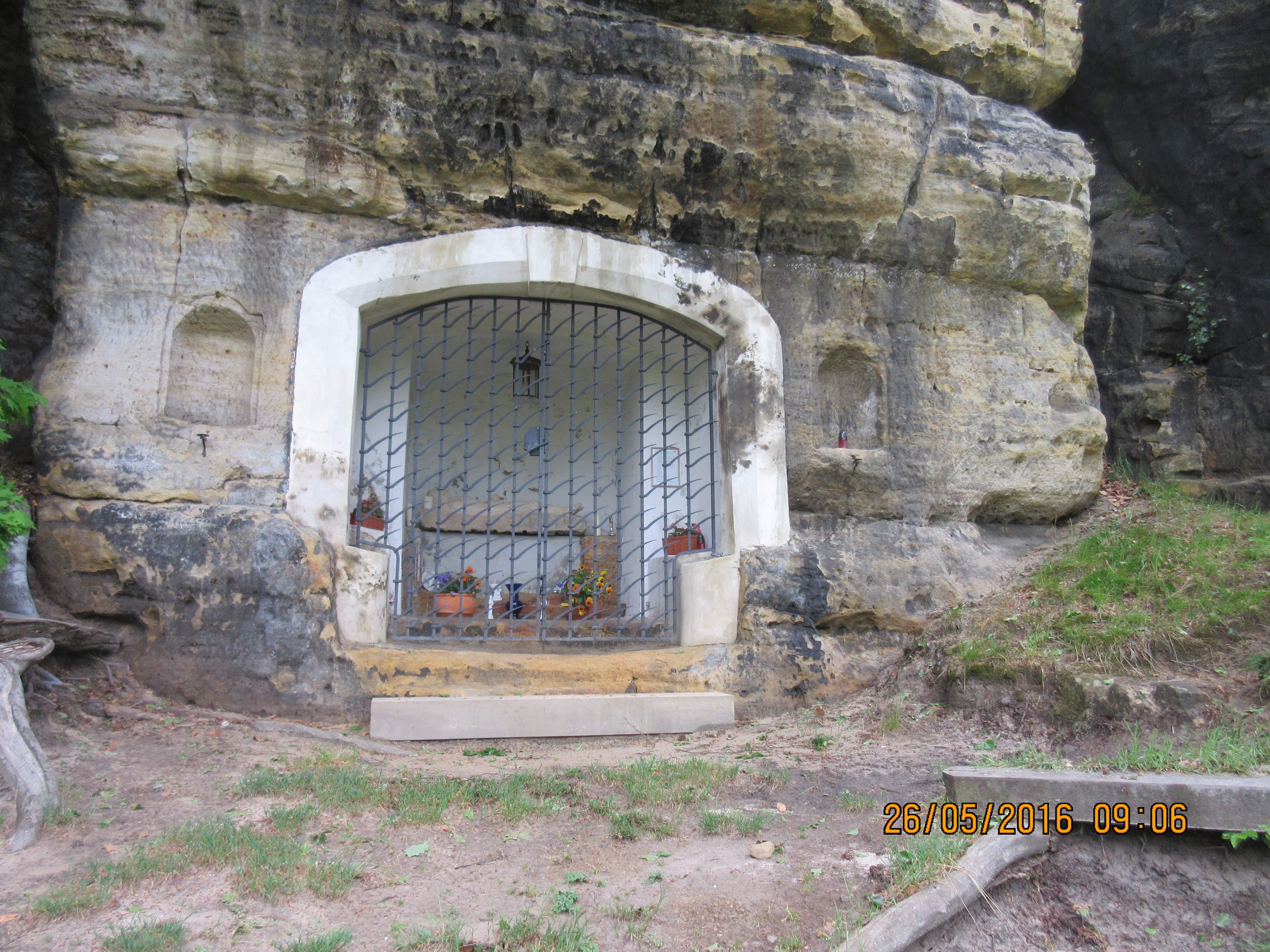 Boží hrob ve skalách na trase Křížové cesty u Kamenického Šenova